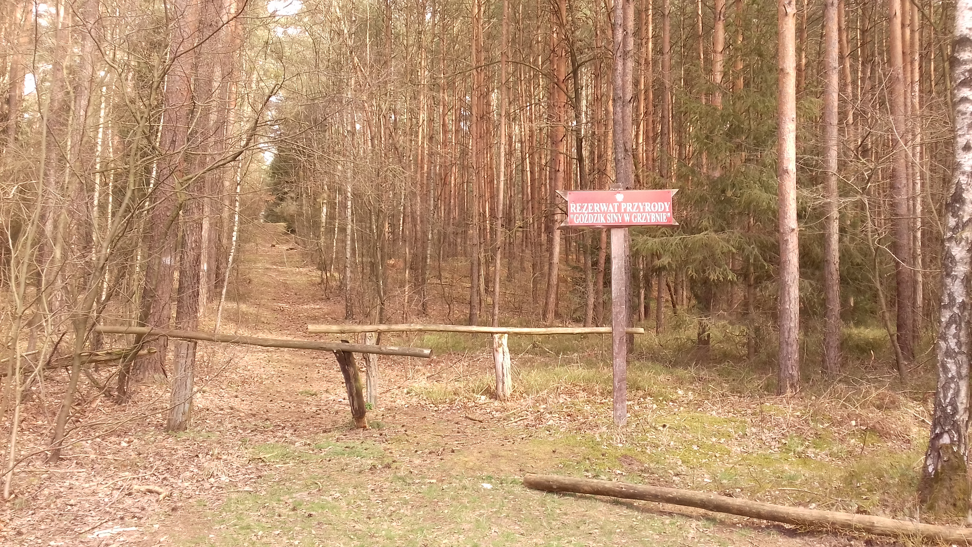 Rezerwat Goździk Siny w Grzybnie w Rogalińskim Parku Krajobrazowym